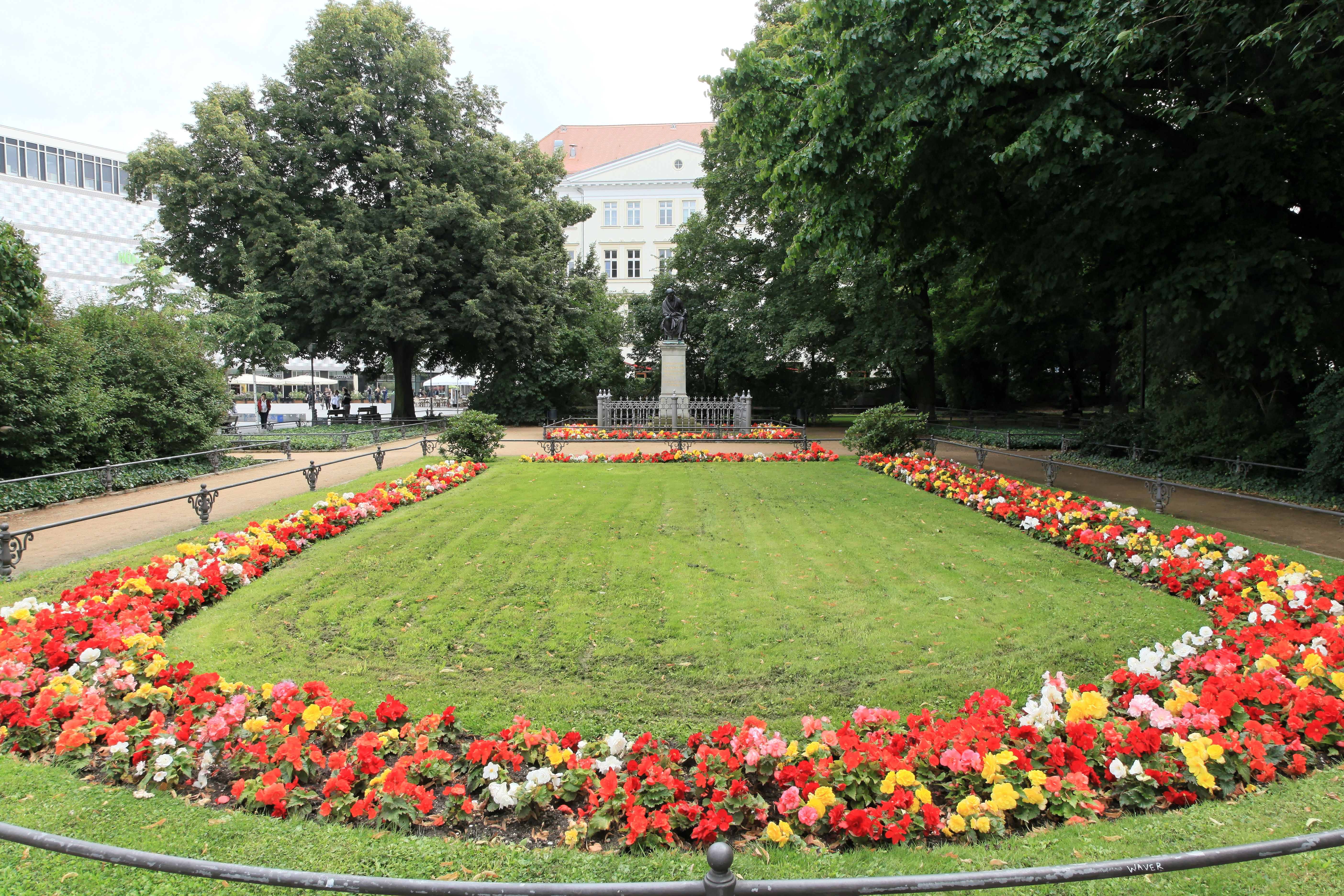 Hahnemann-Denkmal am Goerdelerring-Park in Leipzig